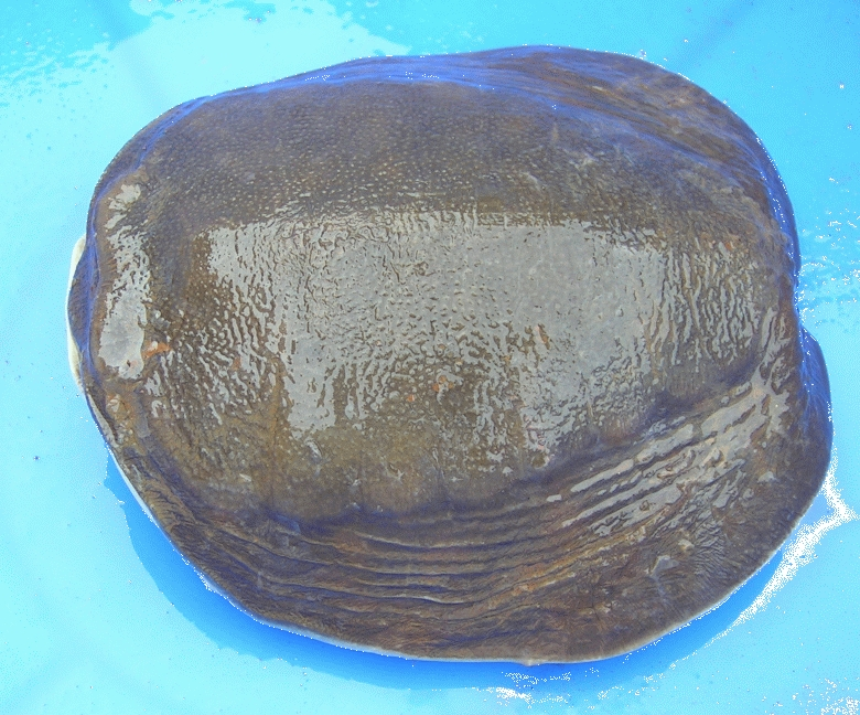 Lissemys punctata, Bannerghatta Rehabilitation Centre, Bangalore